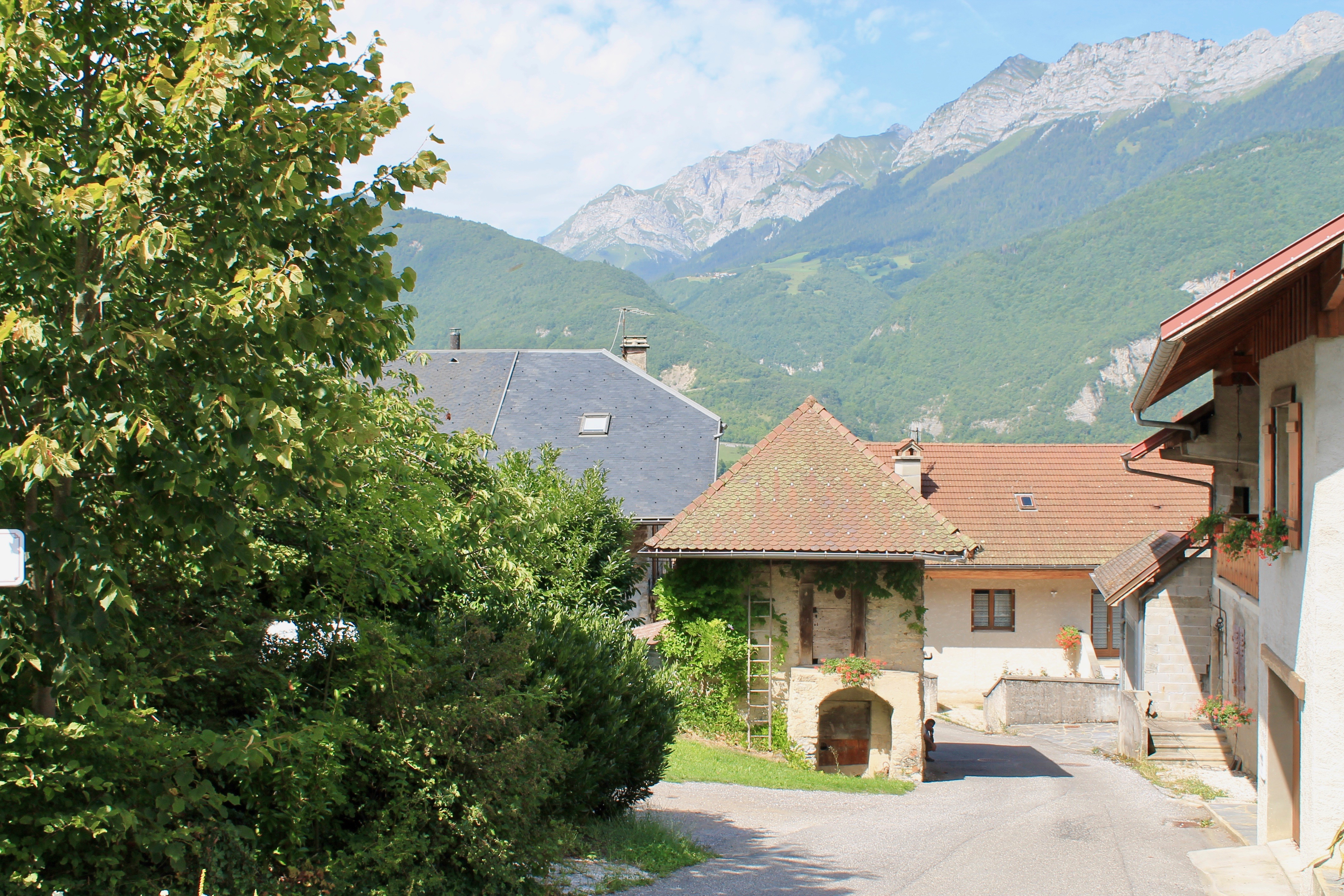 Début de la Route de Vegy, Giez (Haute-Savoie).